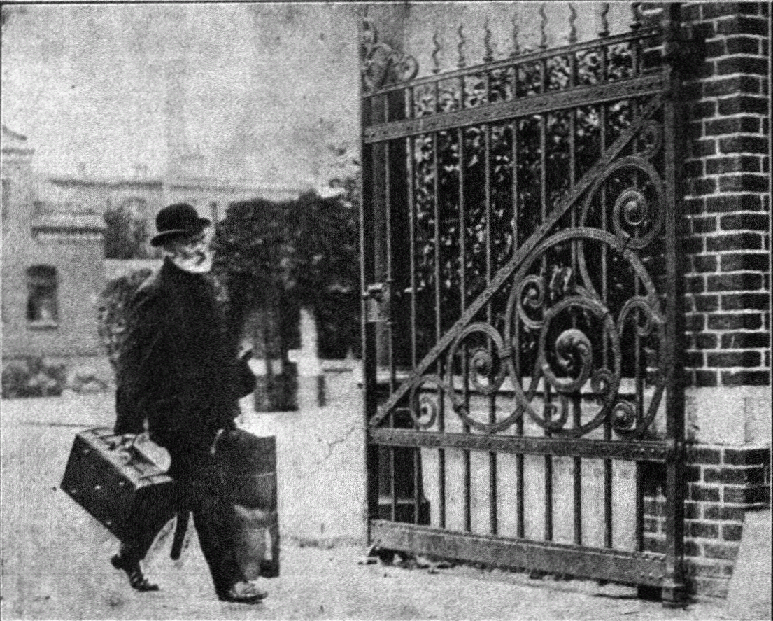 Wilhelm Voigt (1849-1922), der „Hauptmann von Köpenick“ verlässt die Strafanstalt in Tegel